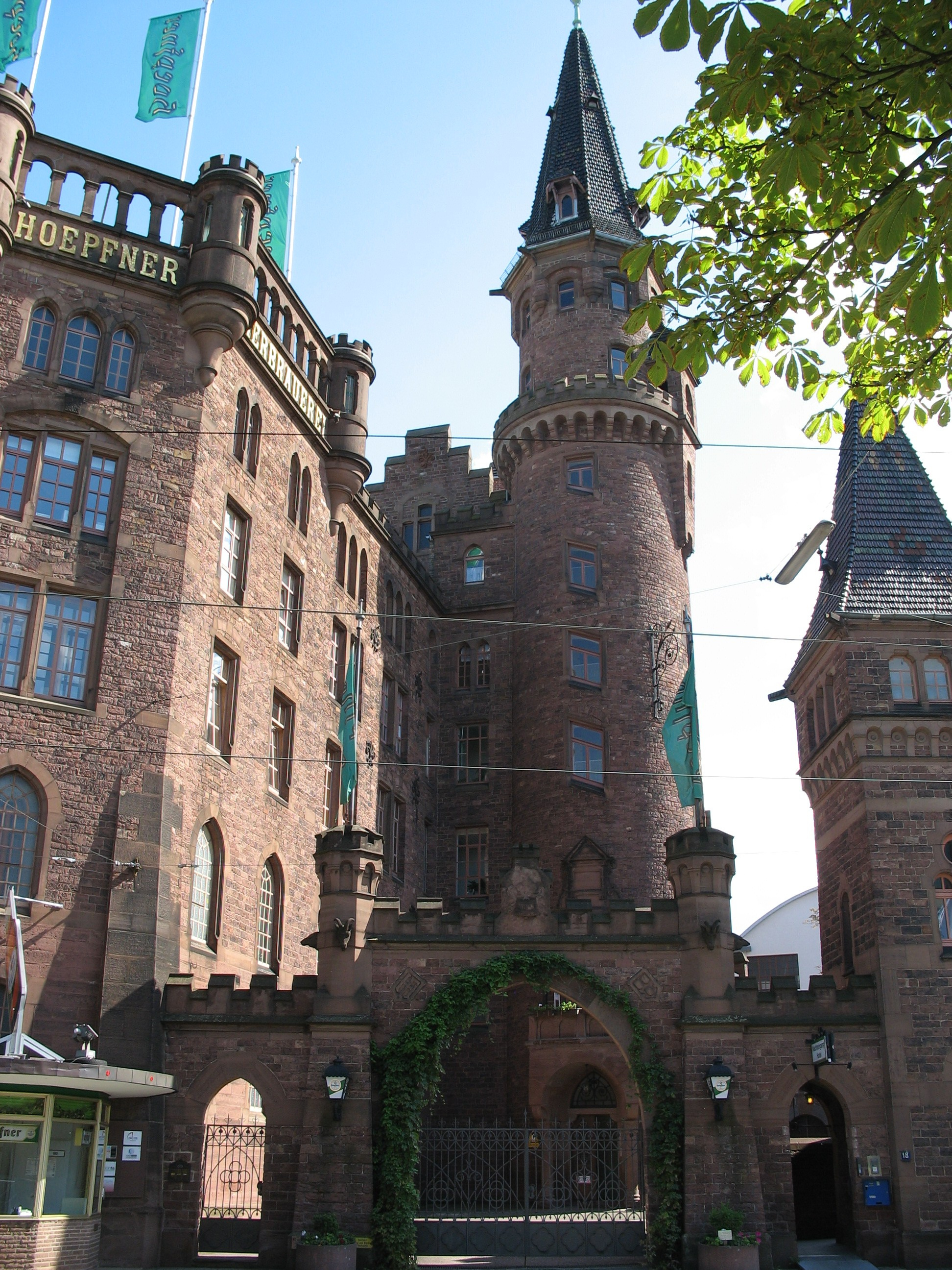 Sujet: Château dans lequel se situe la Brasserie Hoepfner, Karlsruhe (Allemagne). Auteur: Je suis l'auteur de cette photo (Dumont Cédric) Date: samedi 19 août 2006